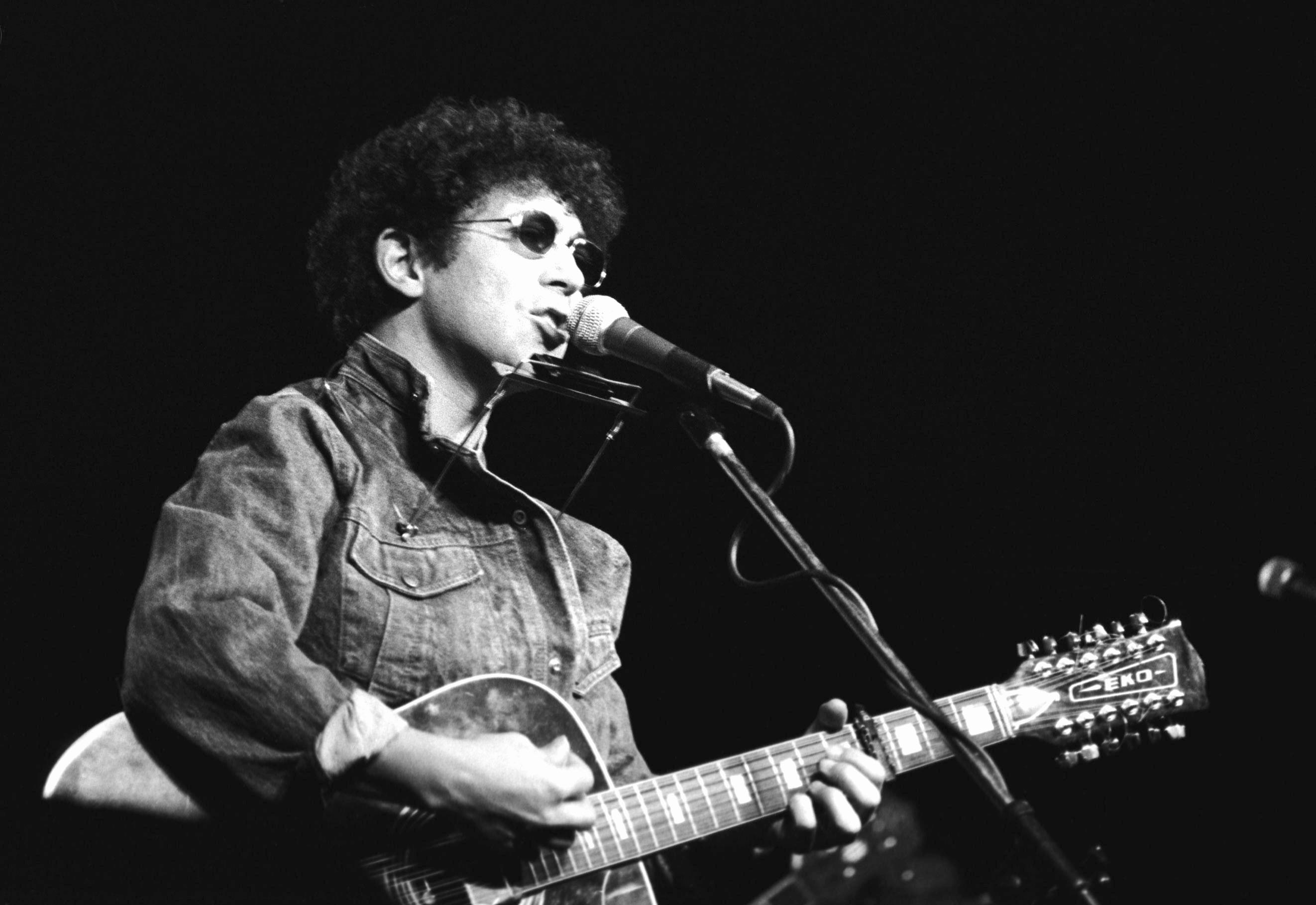 Il cantautore Edoardo Bennato